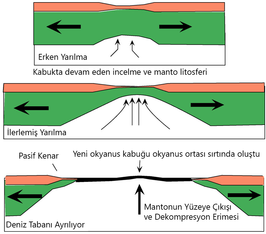 Yayılma riftleşme geçişi